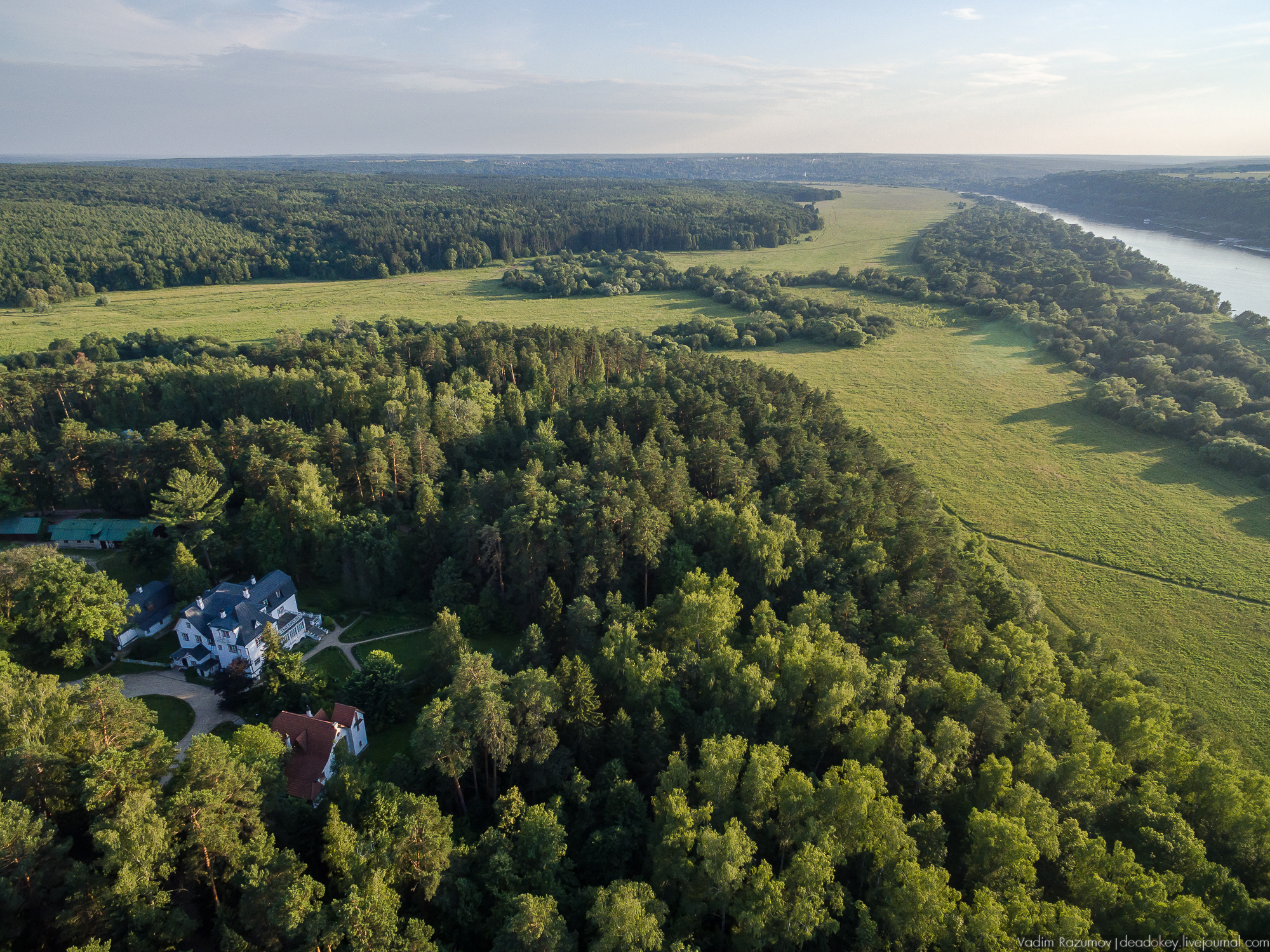 Усадьба Поленова В.Д. Борок-Поленово (Государственный мемориальный историко-художественный и природный музей-заповедник В.Д.Поленова): Бехово, Заокский район, Тульская область